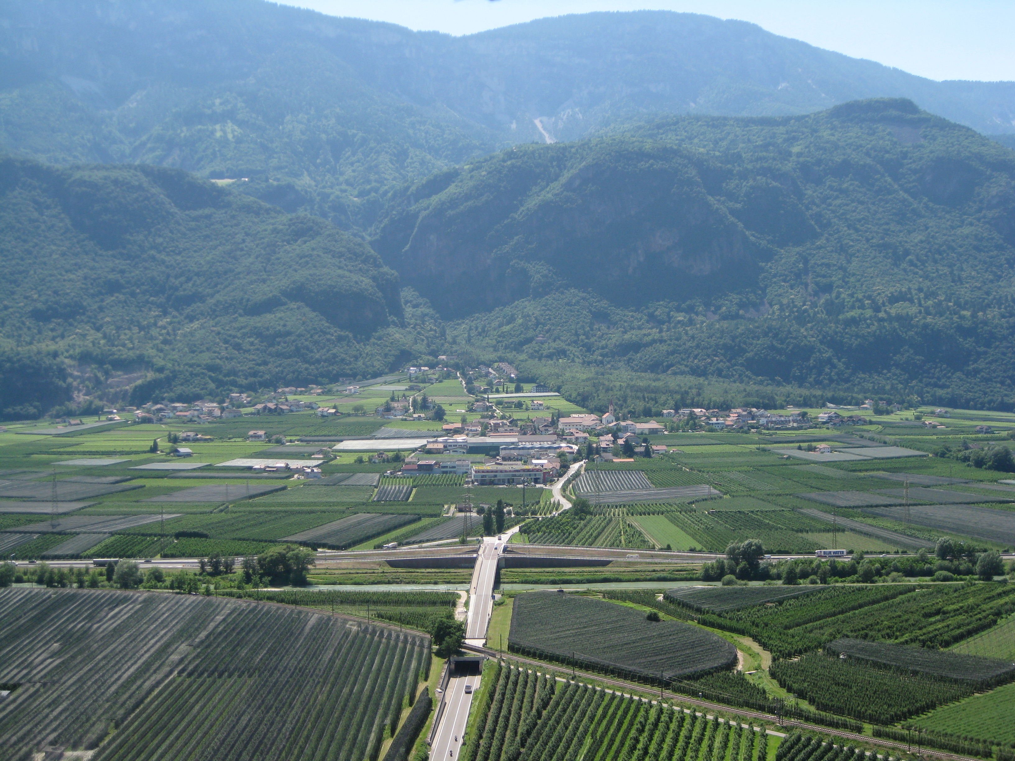 Andrian von Neuhaus